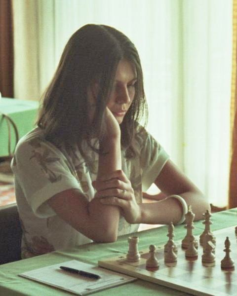 Suzana Maksimovic 1982 in Bad Kissingen